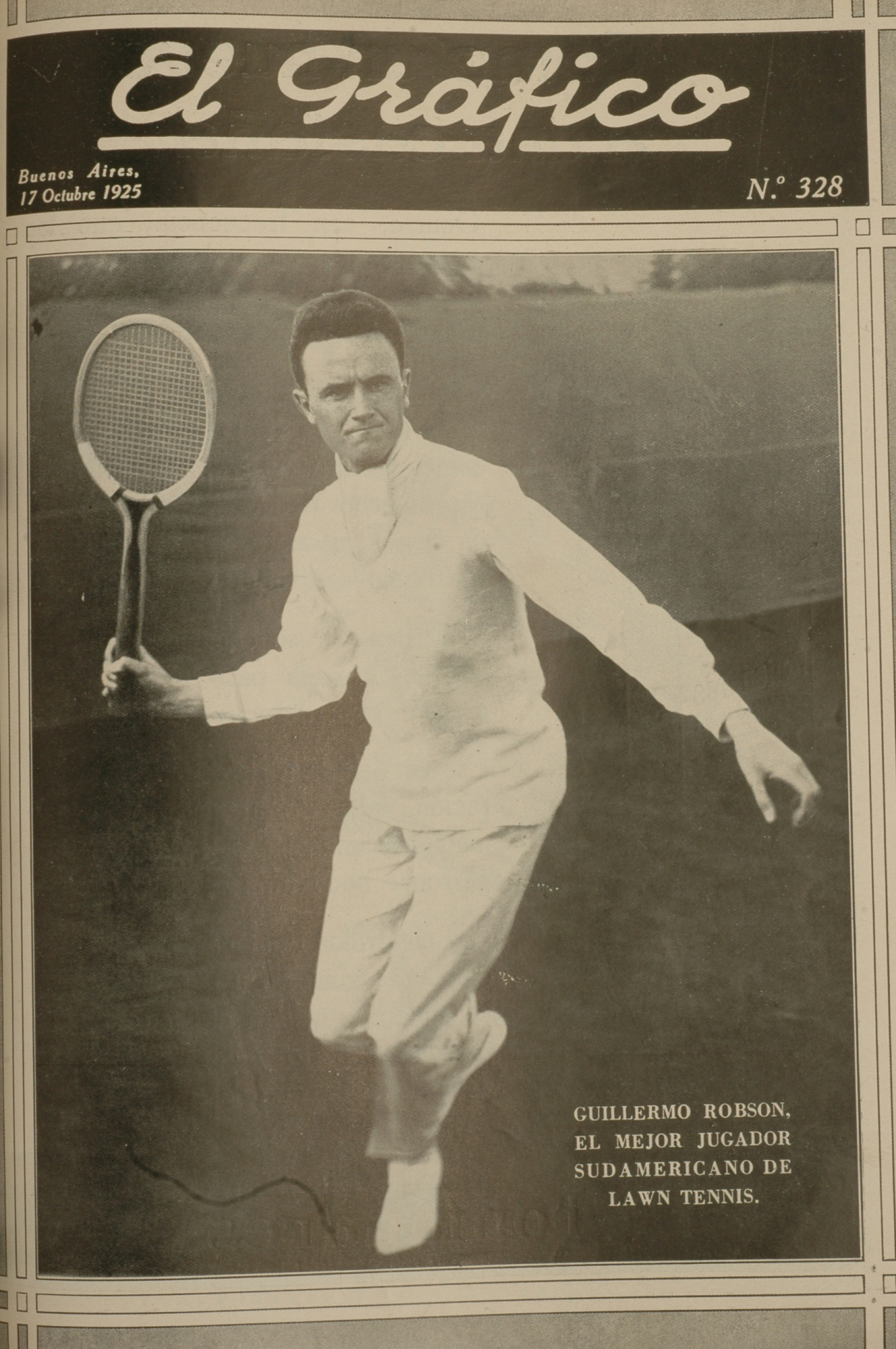 El Grafico del 17 de Octubre de 1925. Edicion 328